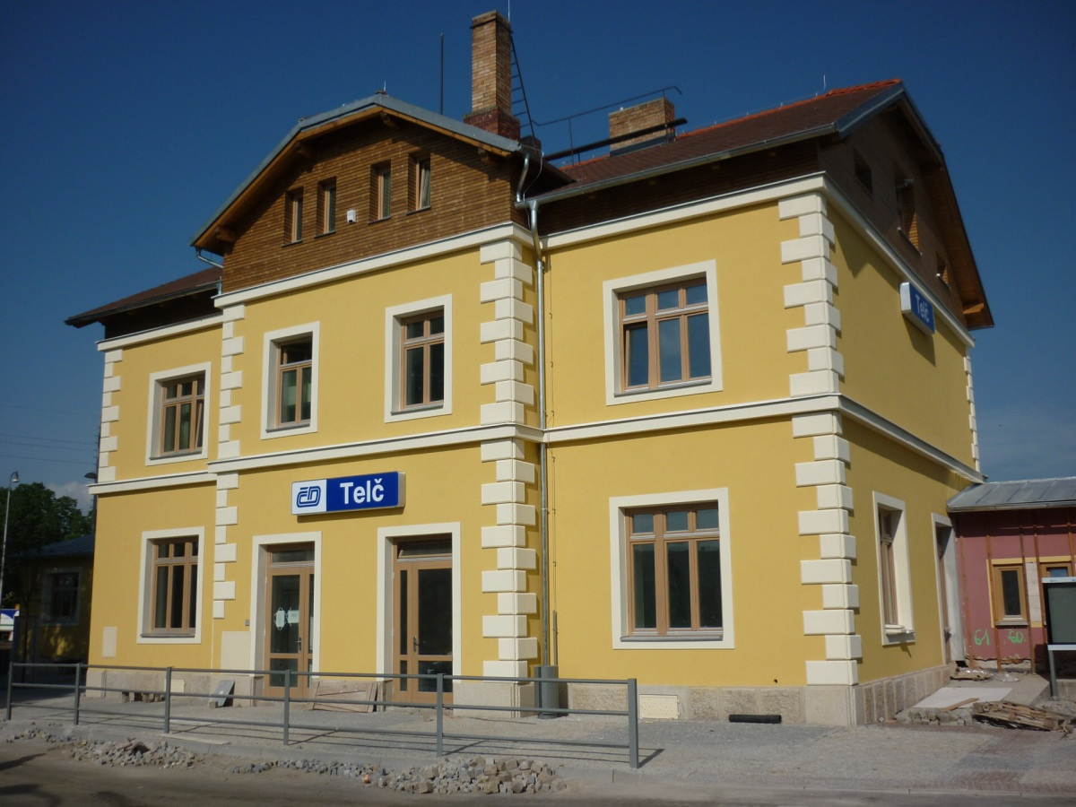 Přestavba nádraží ČD v Telči 2009 - 2010